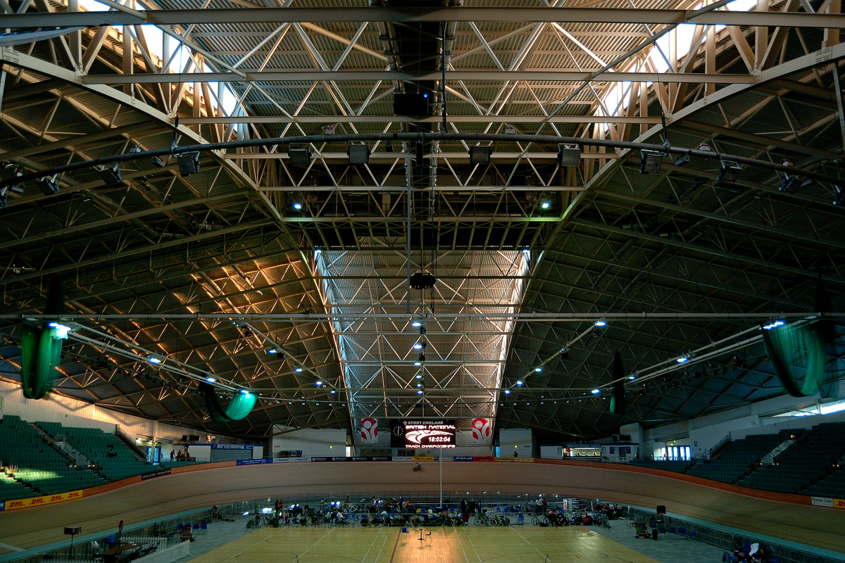 Manchester Velodrome